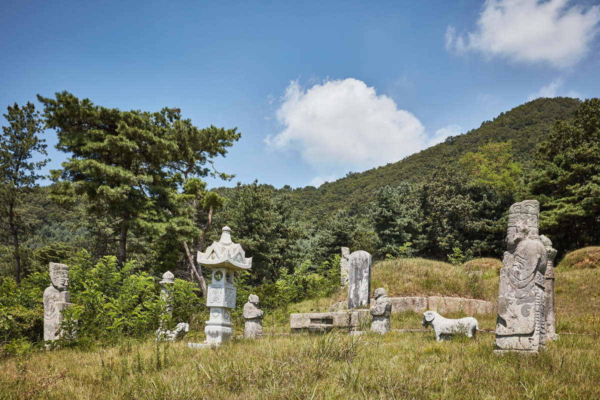 경기도 기념물 제120호 이준선생묘 (李準先生墓)